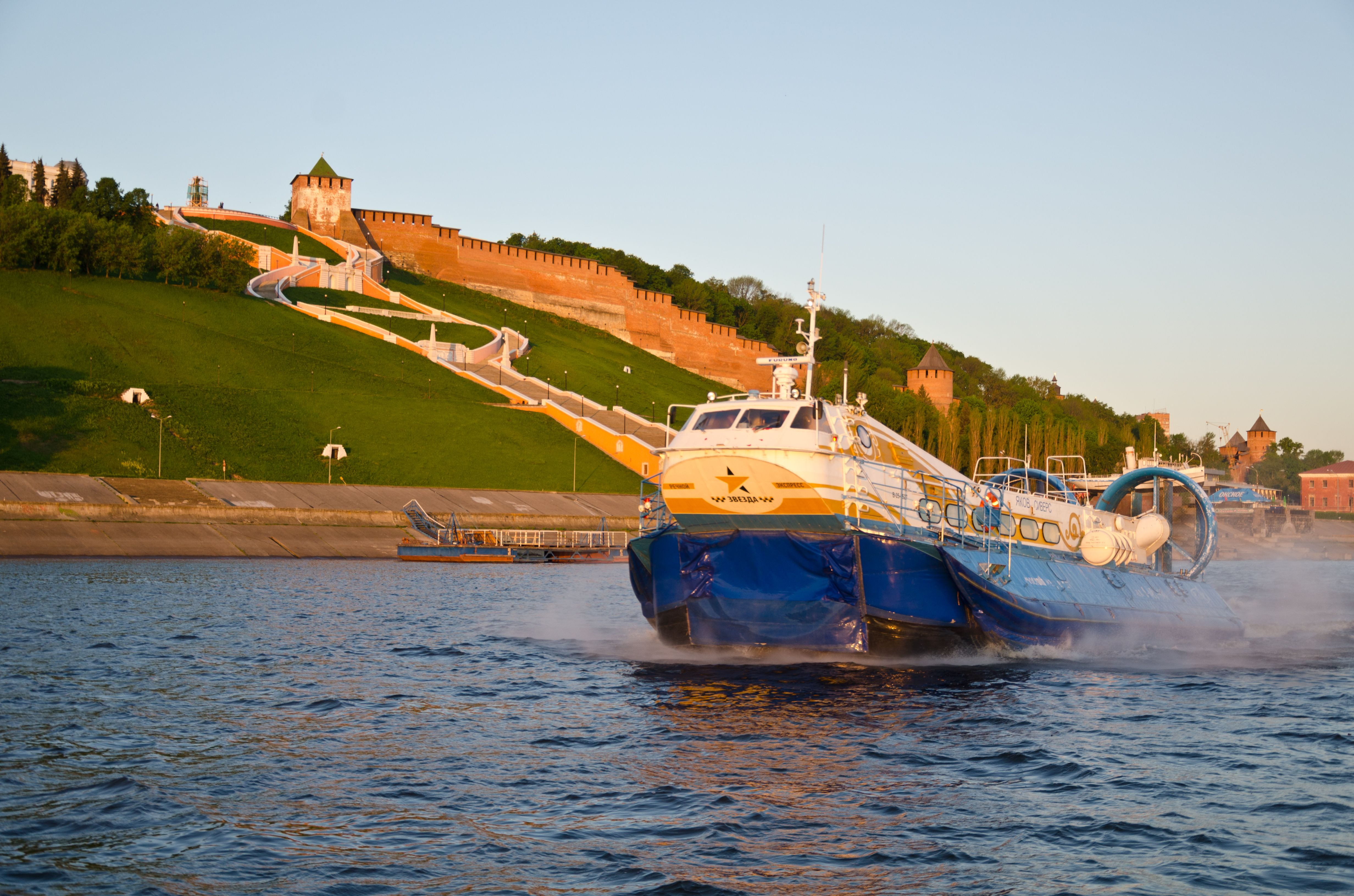 Судно на воздушной подушке Хивус-48 на реке Волга на фоне нижегородского Кремля.Данное СВП работает в качестве пассажирского судна на переправе между городами Нижний Новгород - Бор.